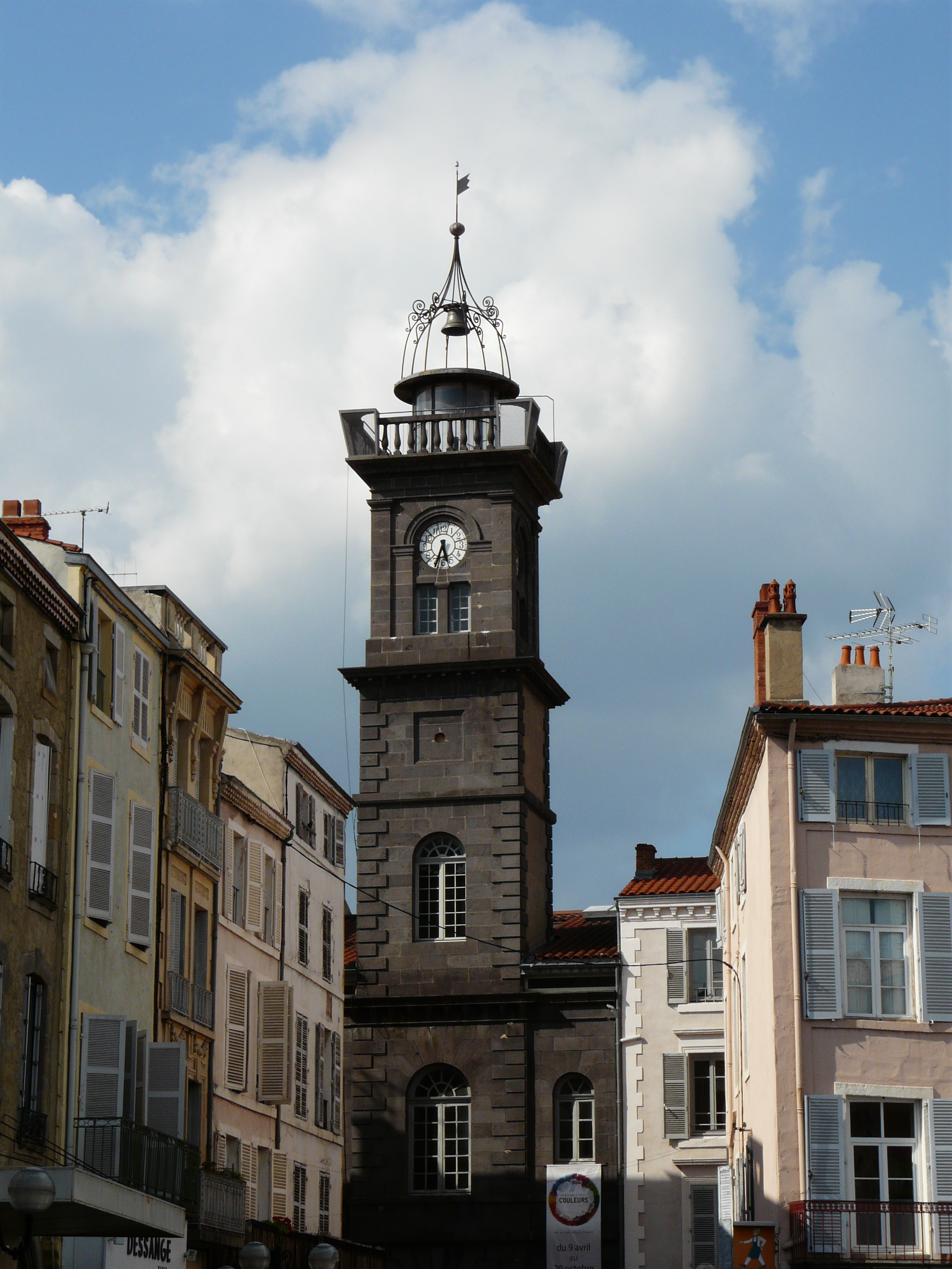 La tour de l'Horloge à Issoire, Puy-de-Dôme, France.